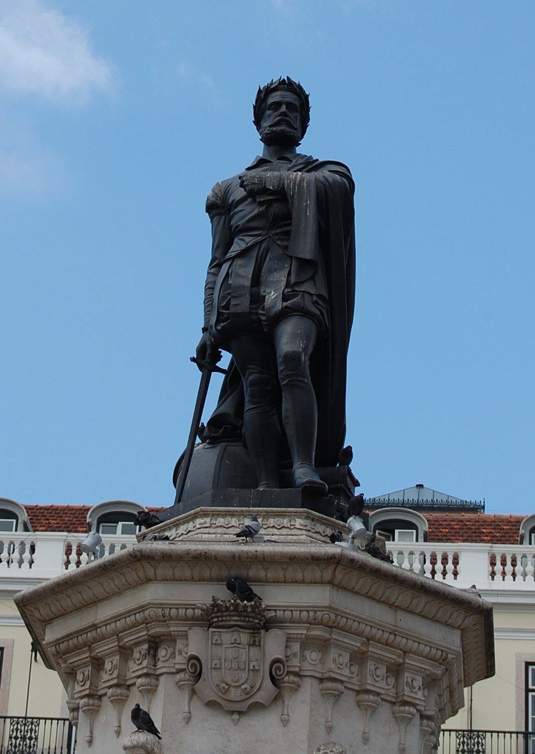 Estátua de Luís de Camões na Praça Luís de Camões, Lisboa Portugal.